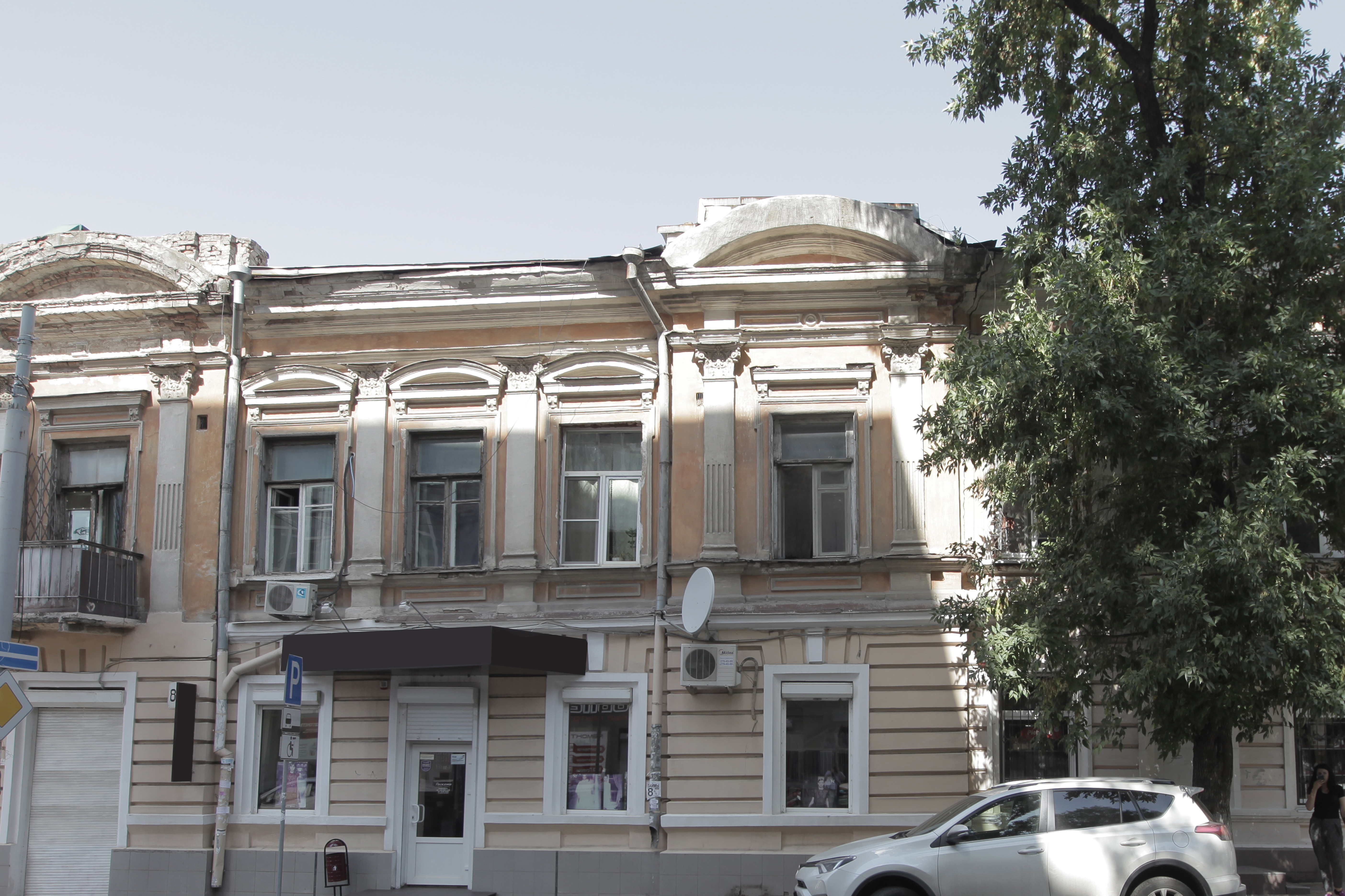 Дом, в котором жил и работал ученый-вирусолог Д.И. Ивановский: ул. Социалистическая, 87, Ростов-на-Дону, Ростовская область